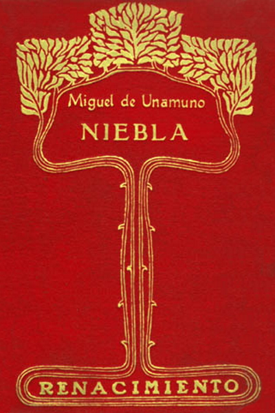 Niebla, Miguel de Unamuno, portada de la primera edición, Renacimiento, 1914